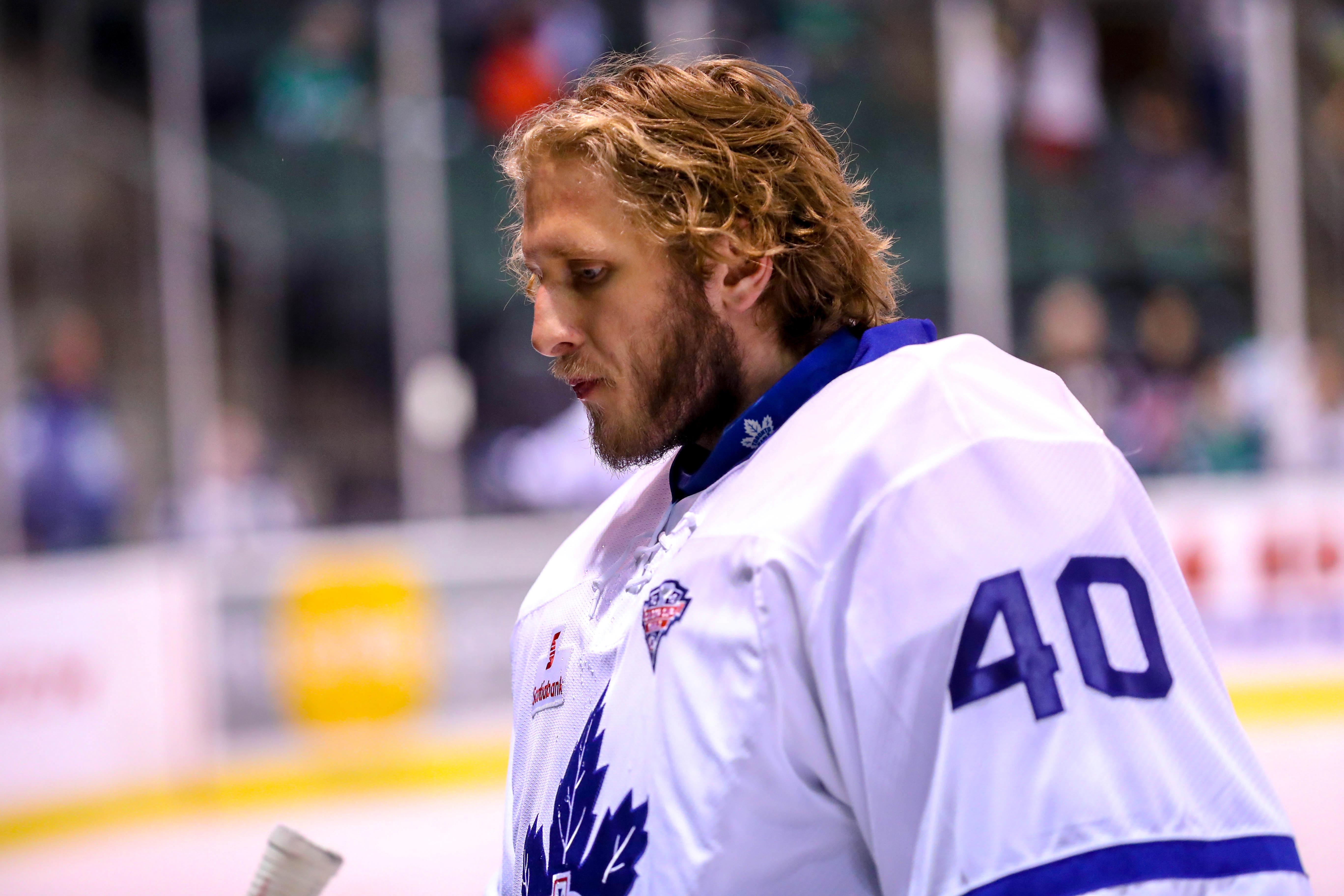 Photo: Derek Sparta